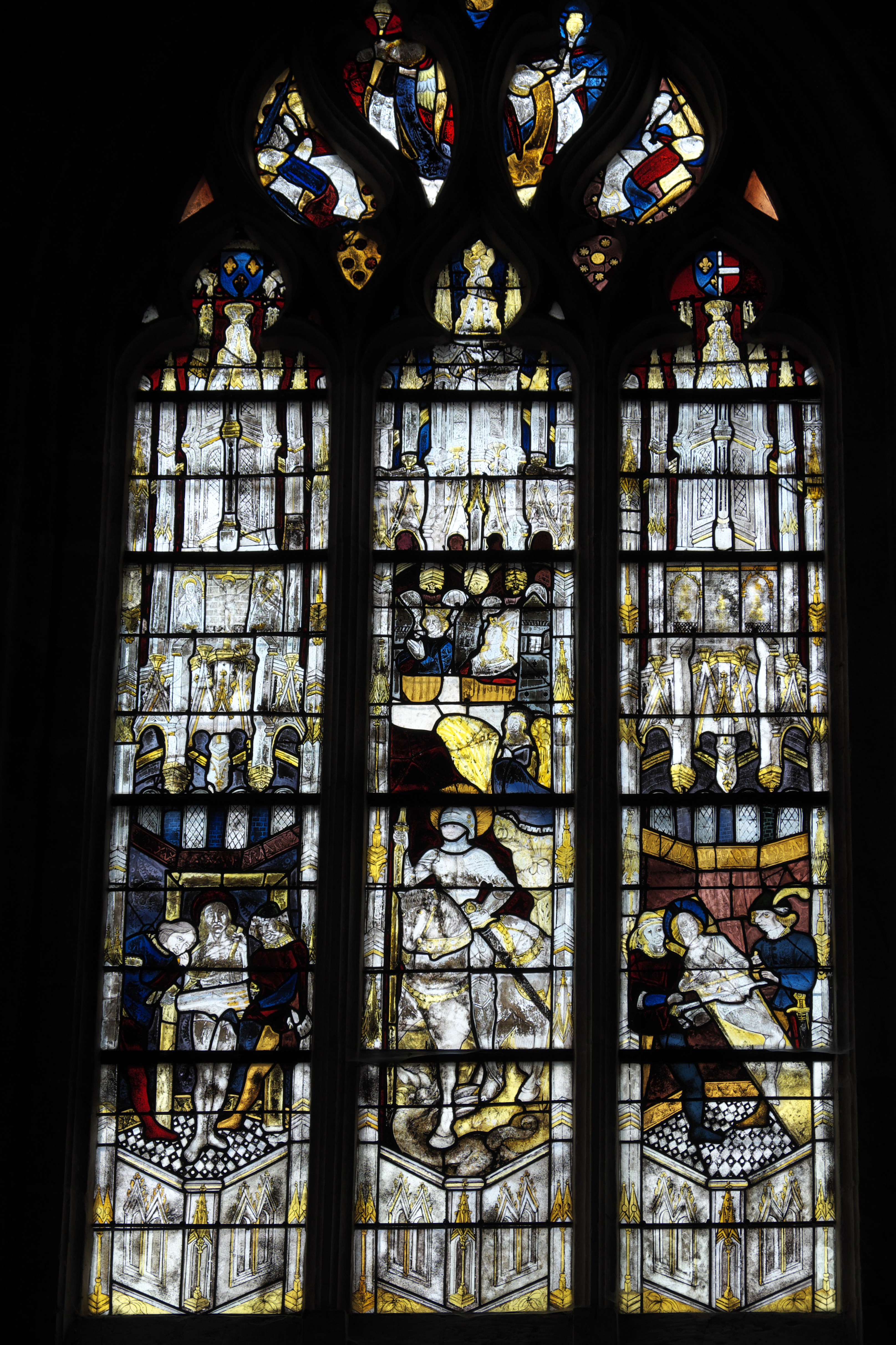 Katholische Pfarrkirche Notre-Dame-des-Marais in La Ferté-Bernard im Département Sarthe (Pays de la Loire/Frankreich), Bleiglasfenster von 1481/83; Darstellung: Szenen der Legende des hl. Georg